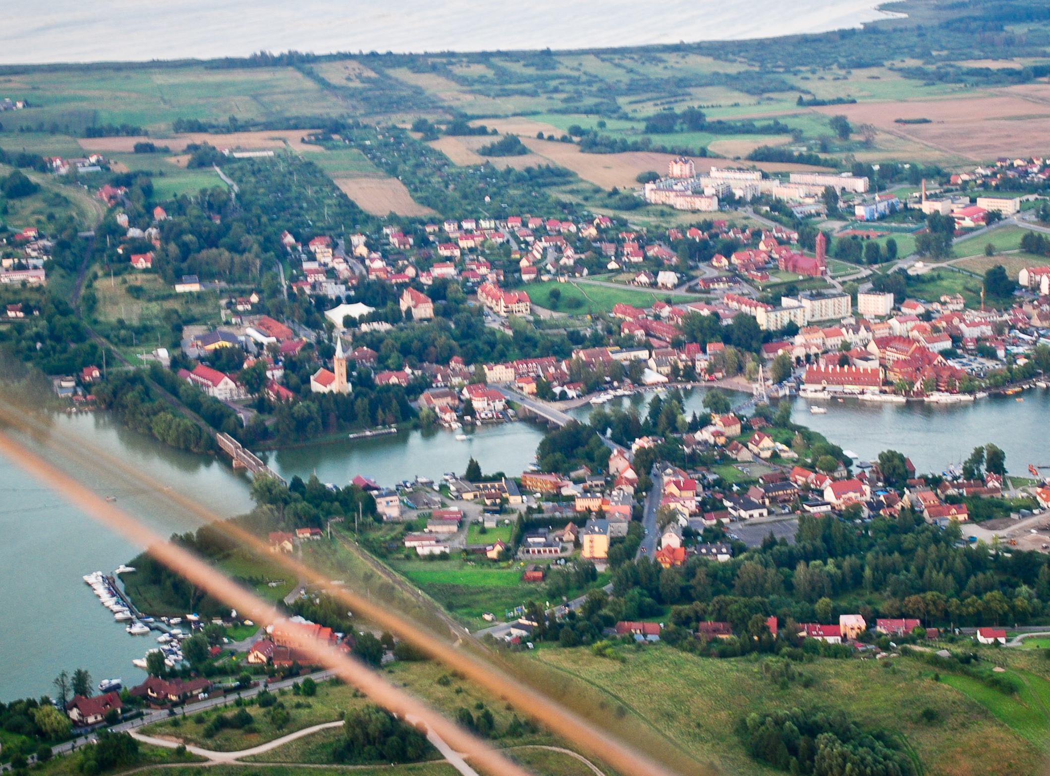 Zdjęcie centrum Mikołajek wykonane z motolotni.